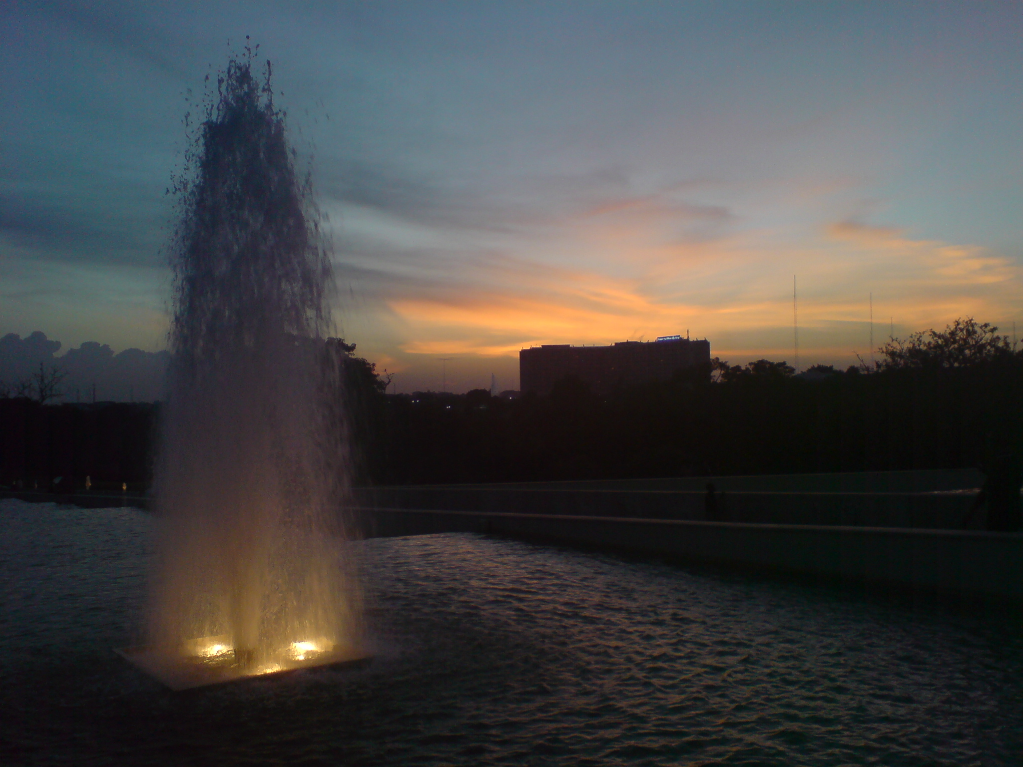 Abuja Millenium Park